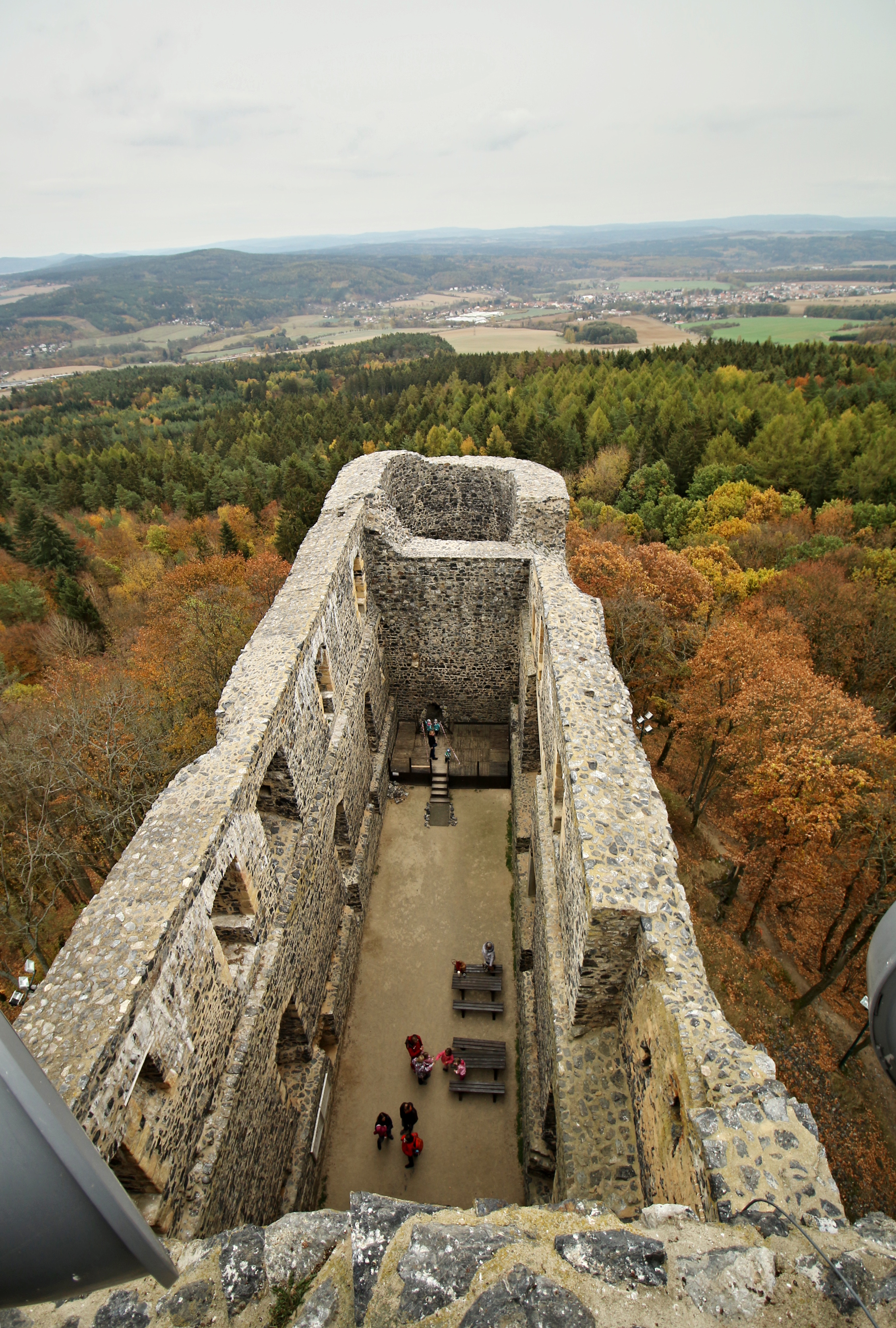 Hrad Radyně, interirér